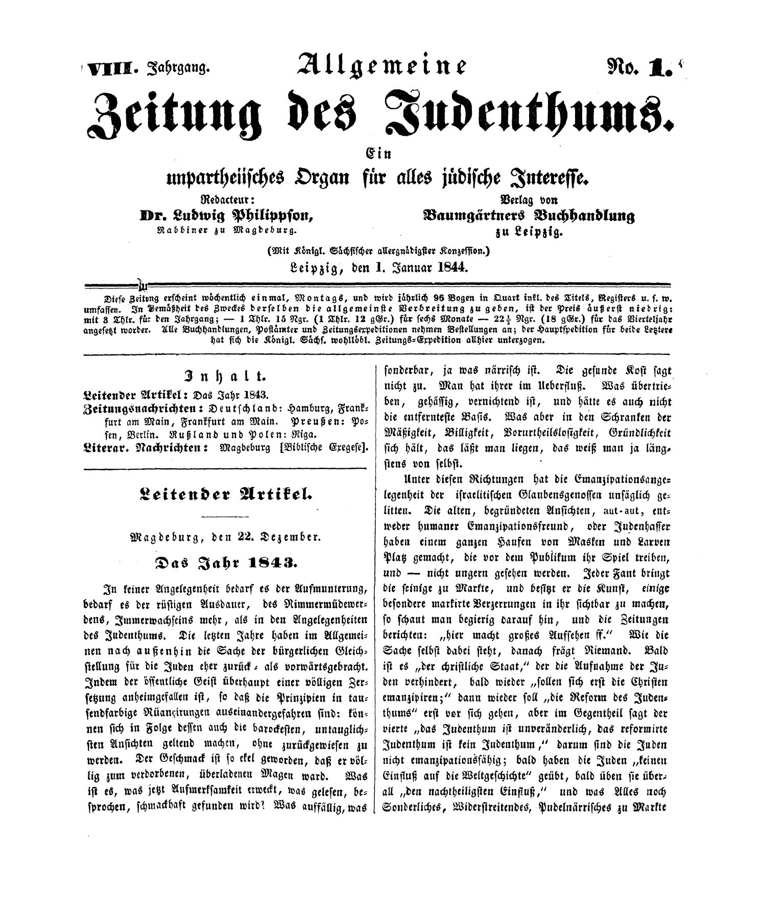 Allgemeine Zeitung des Judentums